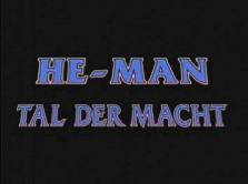 Deutsches Vorspann-Bild der Zeichentrick-Serie He-Man and the Masters of the Universe, die in Deutschland unter dem Titel He-Man - Tal der Macht ausgestrahlt wurde.